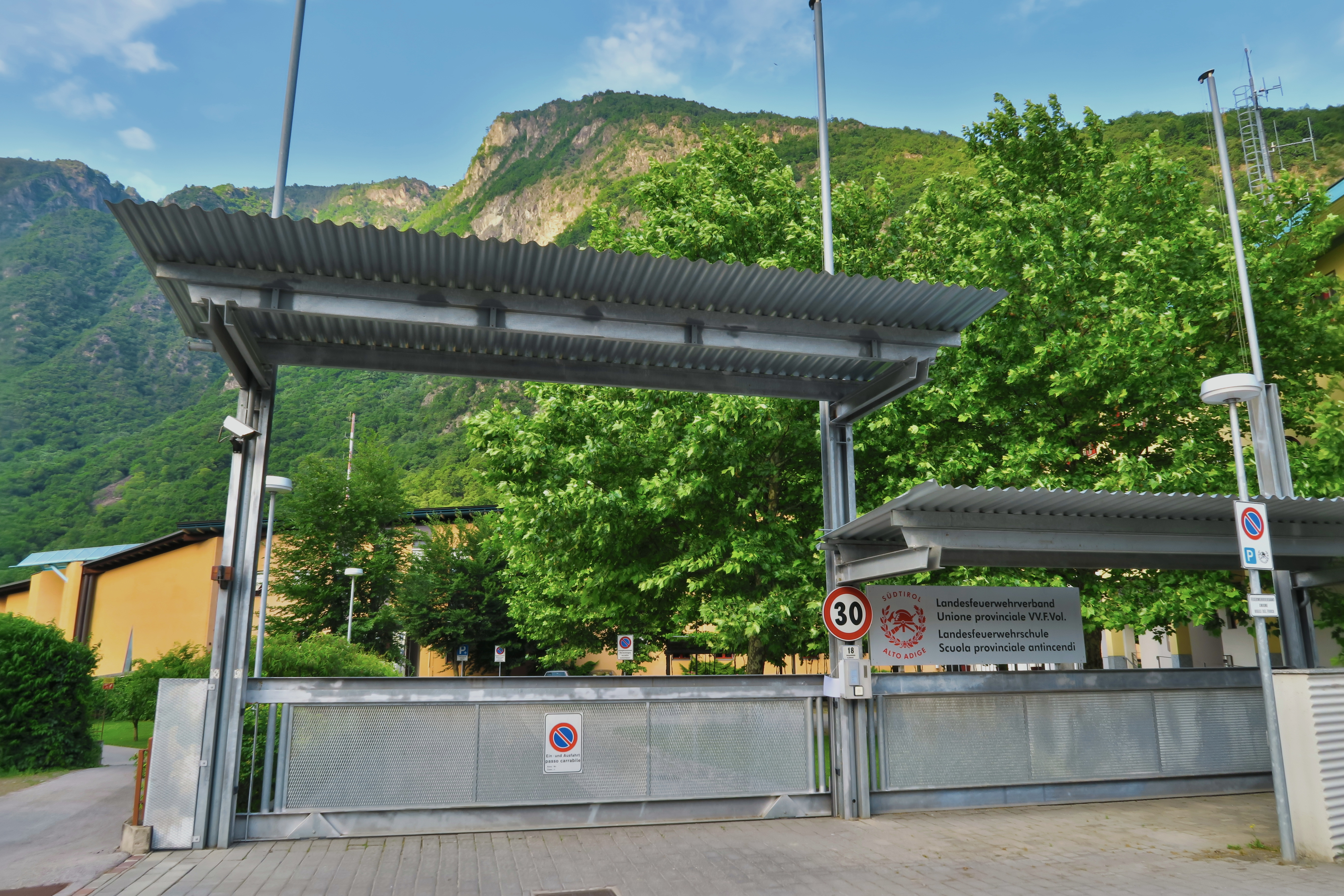 Italien, Südtirol, Terlan, Vilpian: Landesfeuerwehrfachschule, Haupteinfahrt